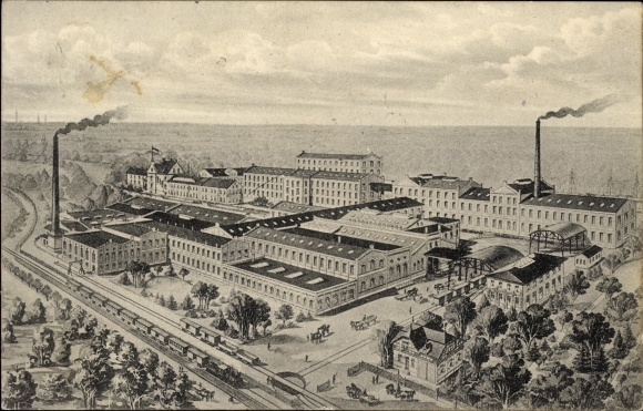 Papierfabrik Schoeller & Bausch (vor 1913)